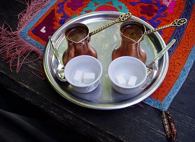 Bosanska-kafa-dzezva-fildzan